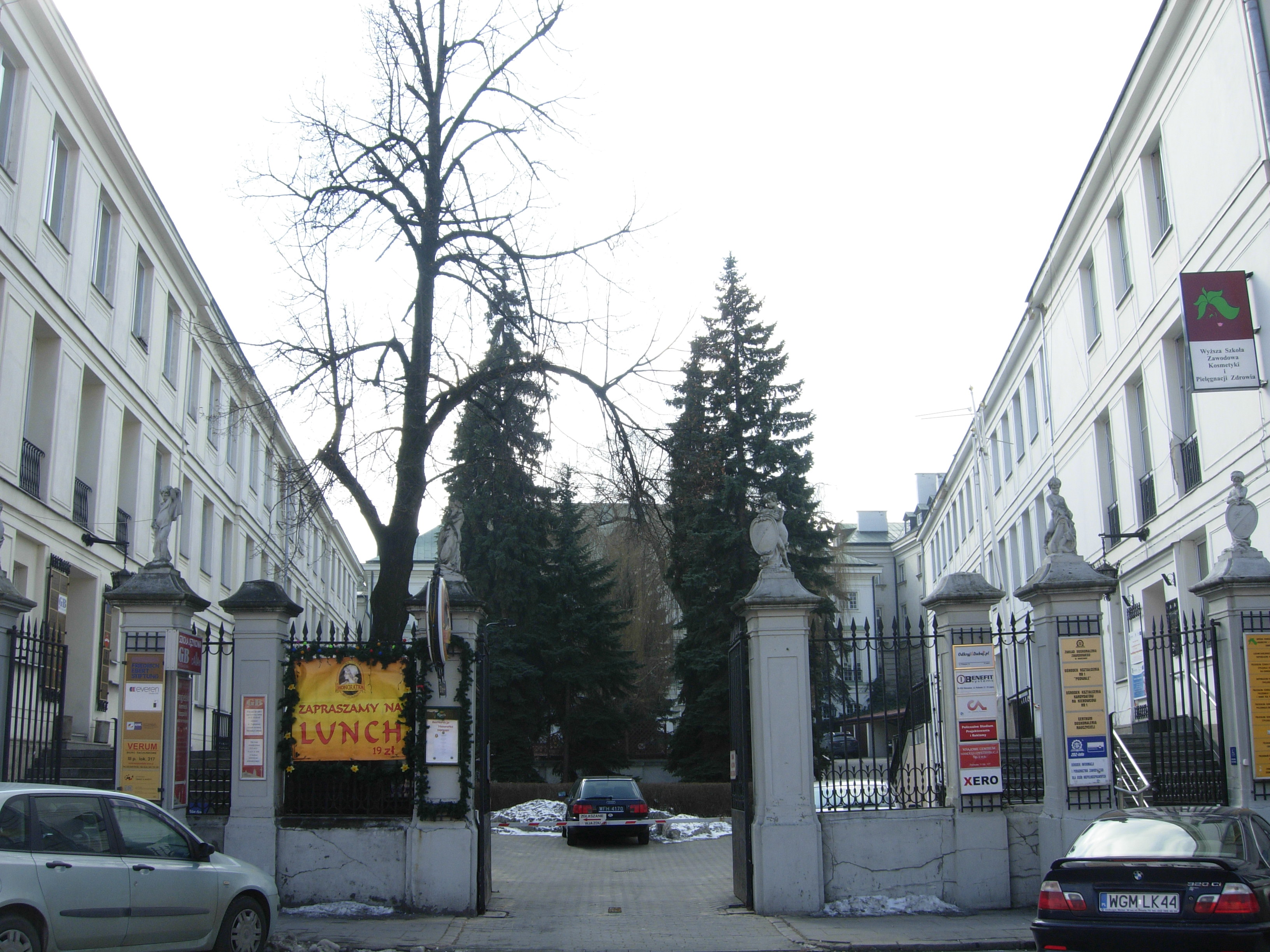 Brama od Podwala 13 - Pałac Chodkiewiczów w Warszawie